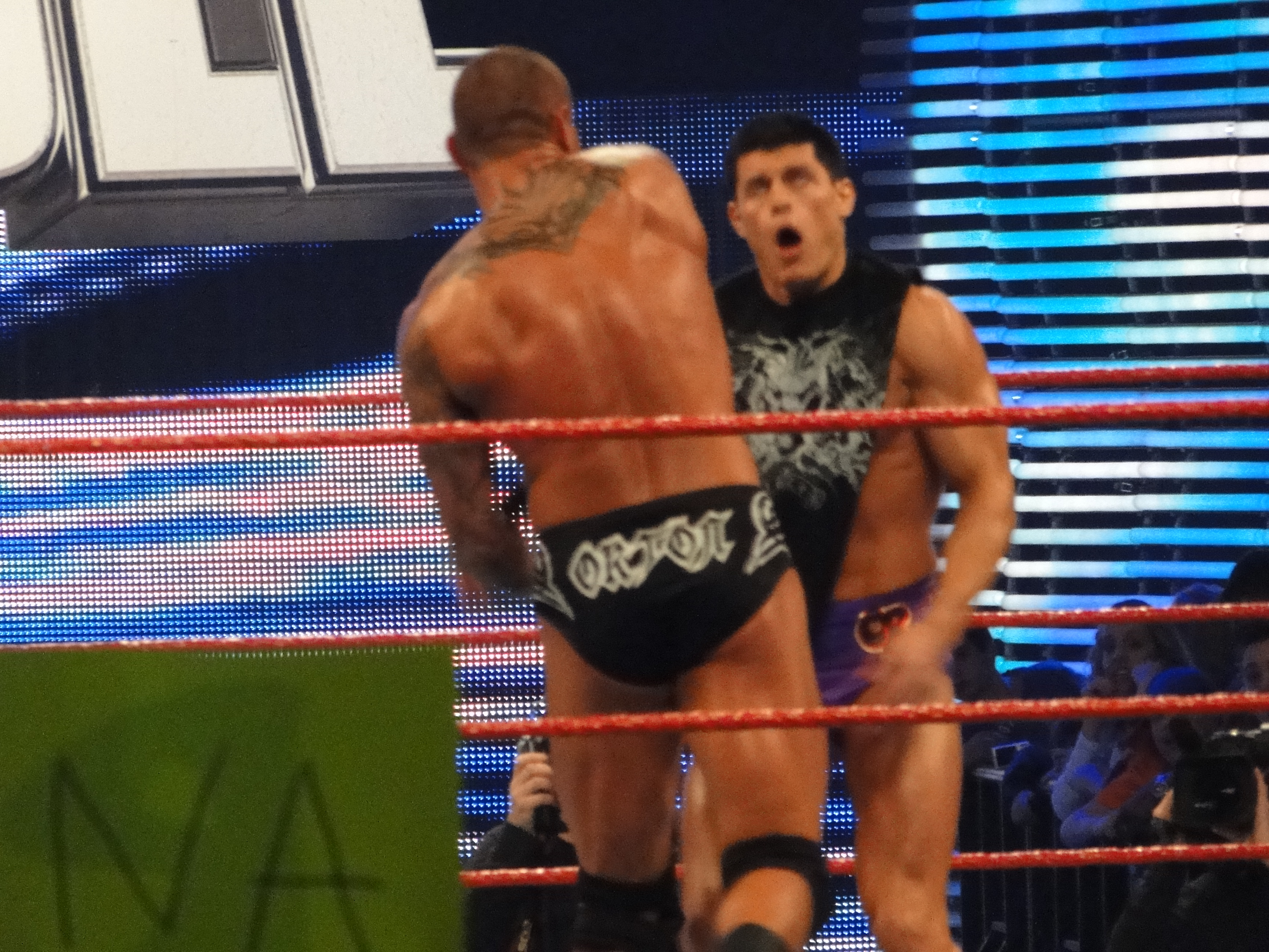 Orton attacking Rhodes after being dq